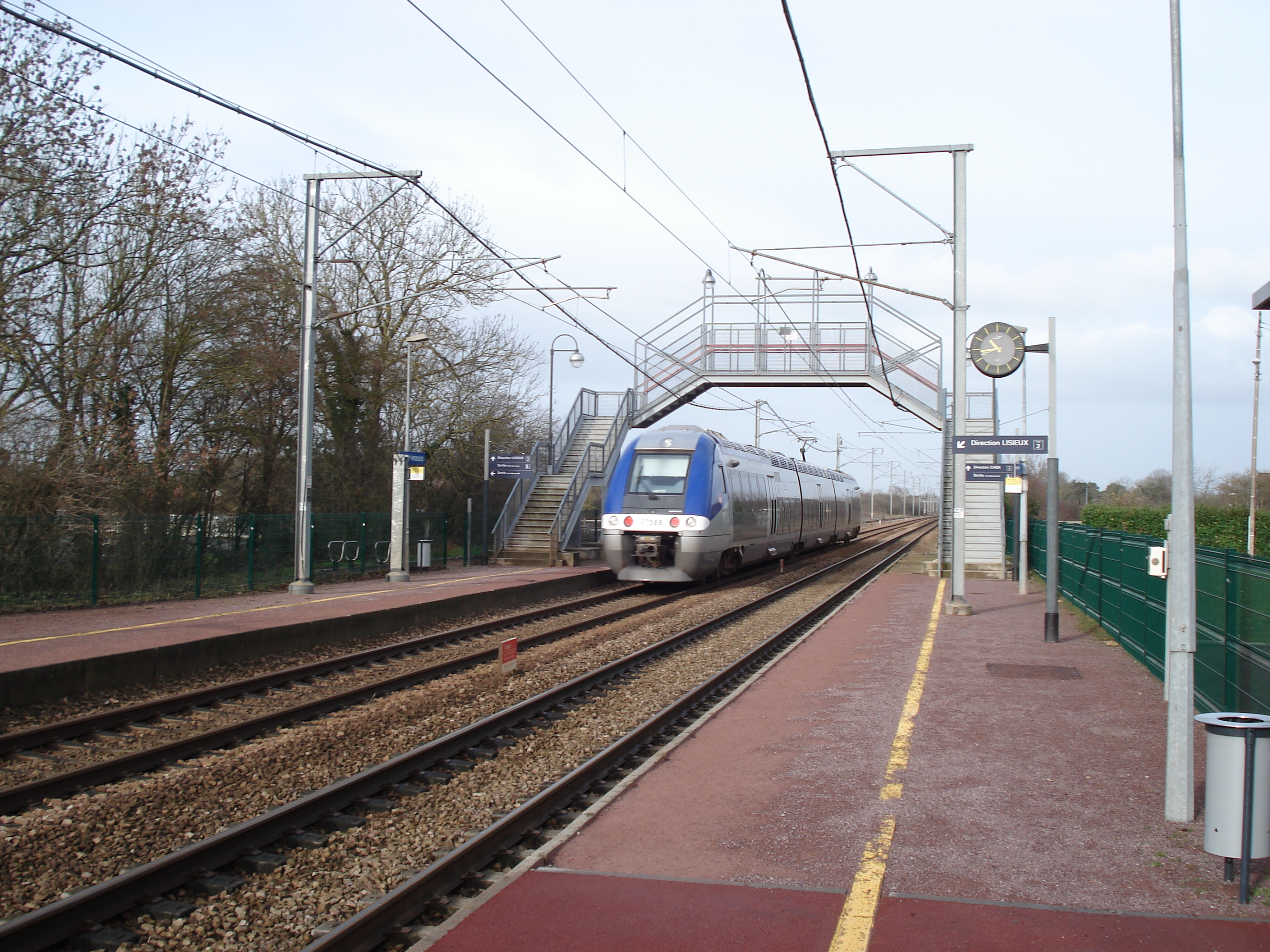 Gare de Moult Argences (Calvados France)